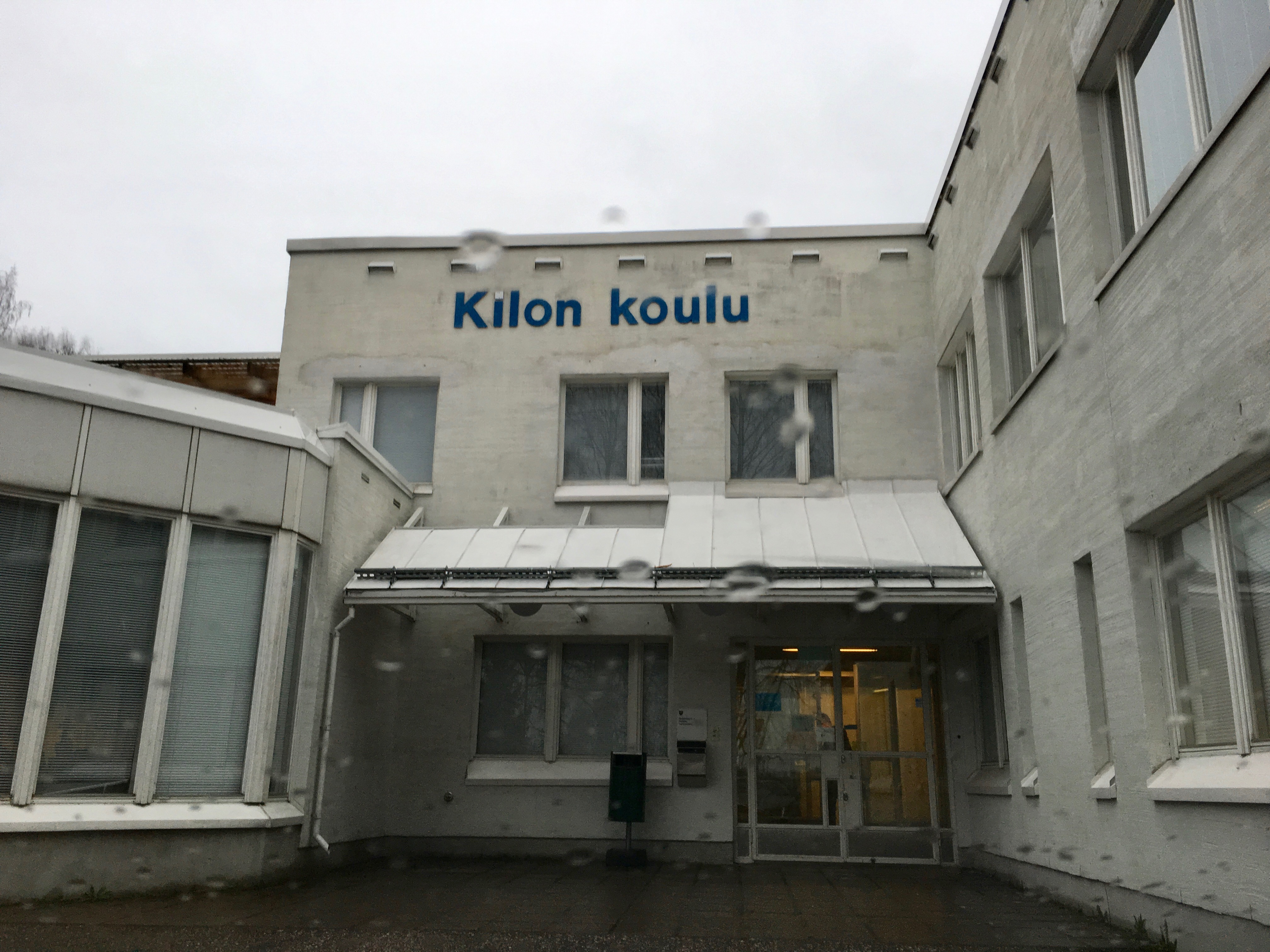 Kilon koulu on alakoulu Espoon Kilon kaupunginosassa.